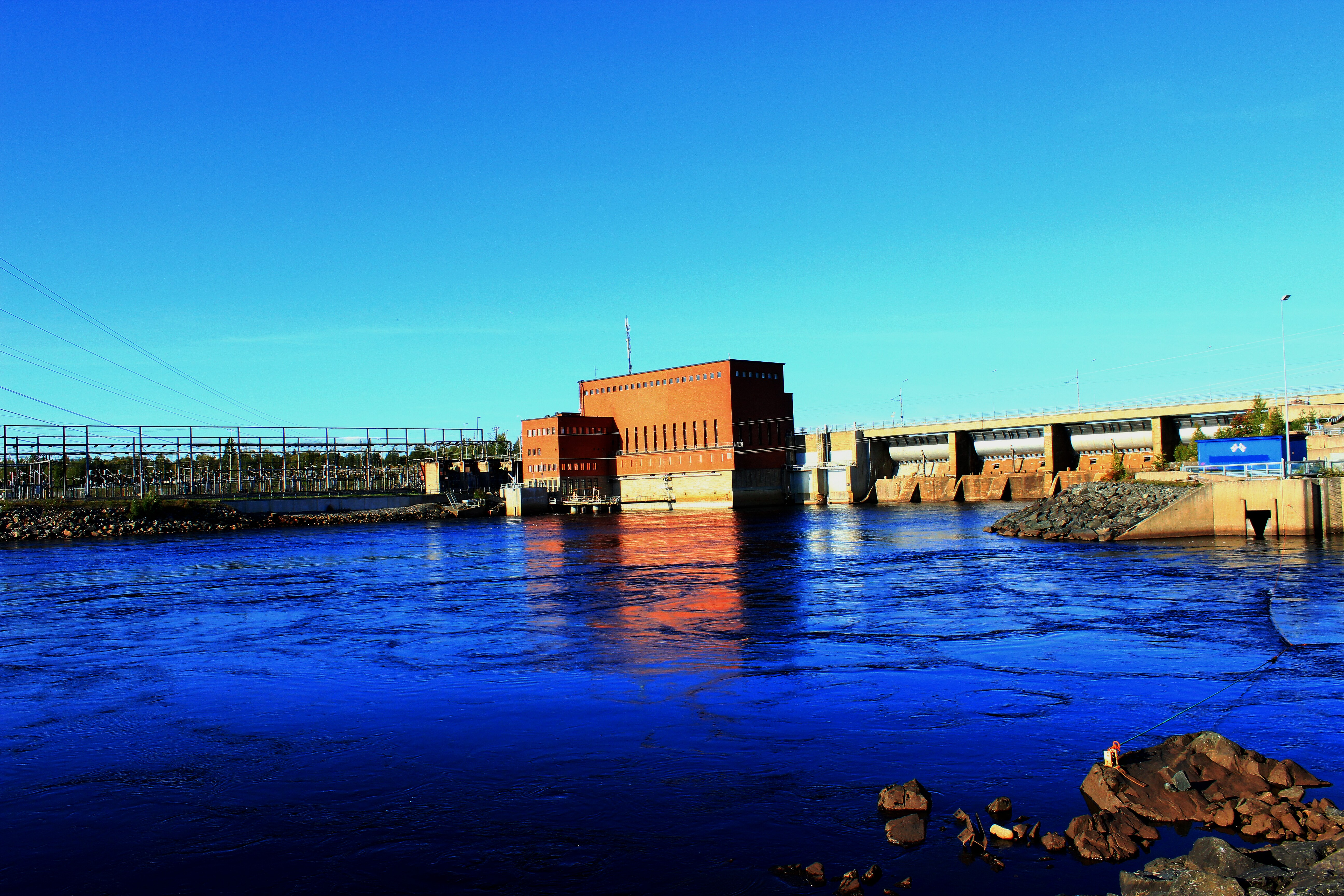 Isohaaran voimalaitos